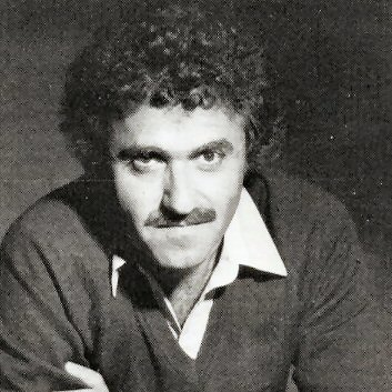 Steve Pieczenik